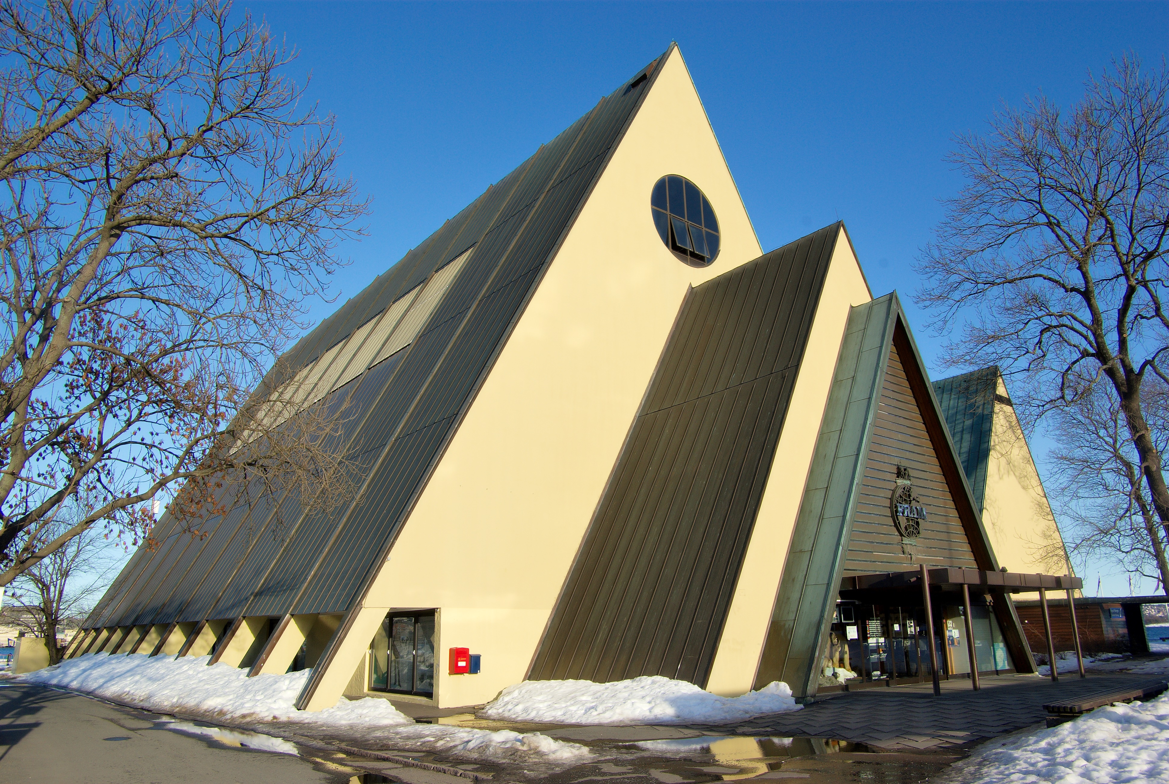 Fram-museet på Bygdøy i Oslo.